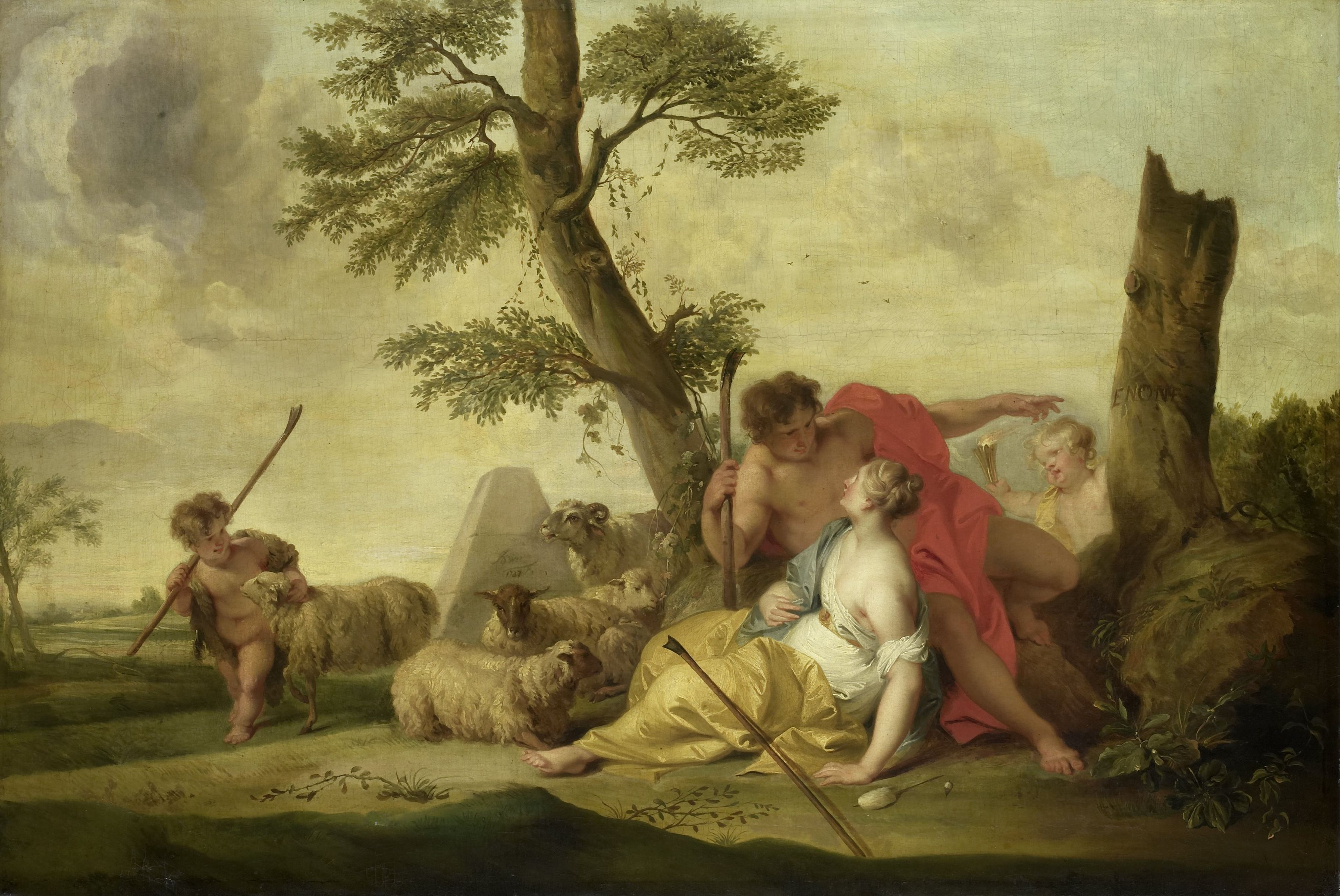 In een landschap aan de voet van een boom buigt de herder Paris zich over de herderin Oenone. Links een putto als herdertje bij de schapen, rechts een putto met een fakkel.